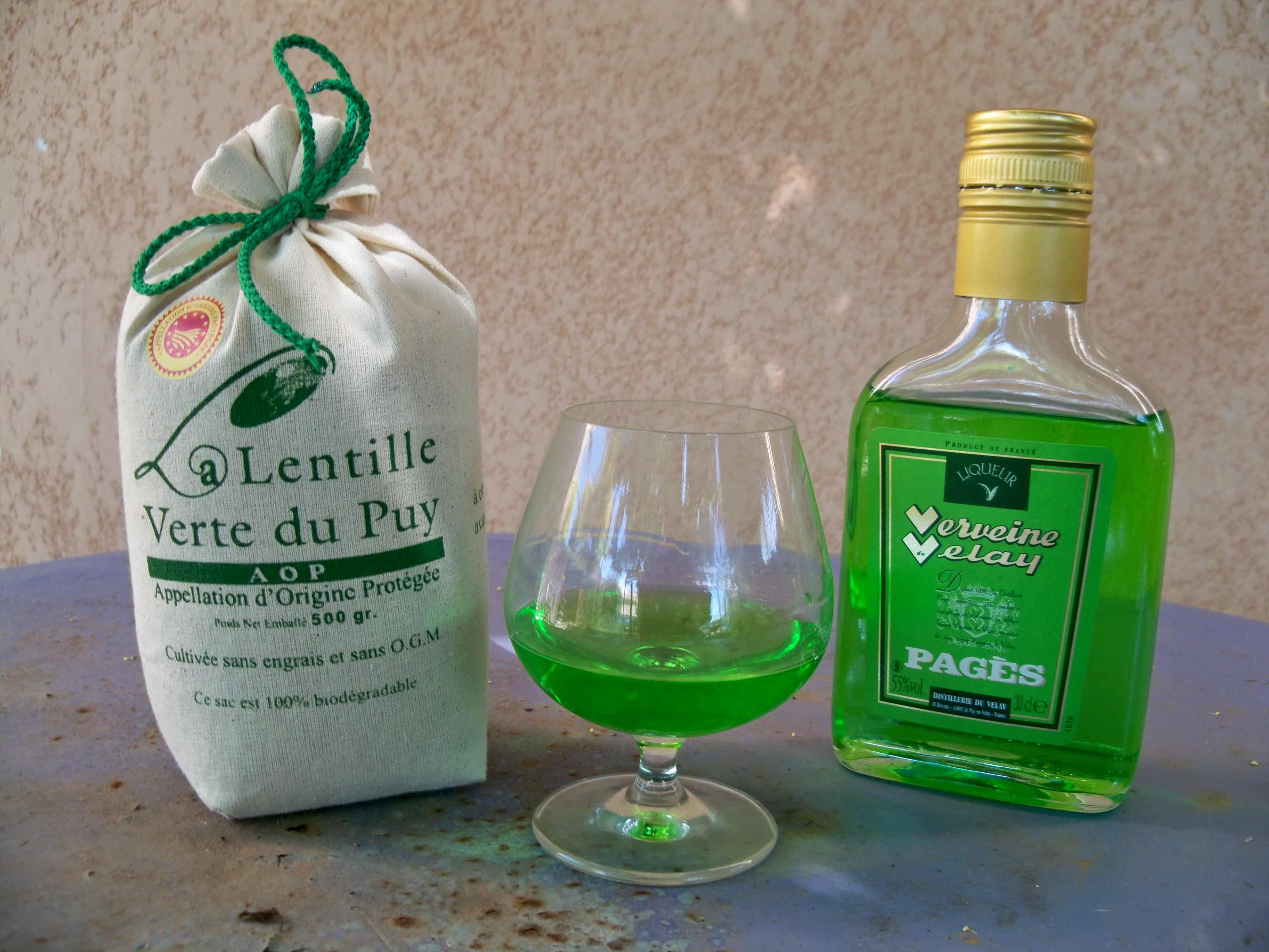 Sachet de lentille verte du Puy et bouteille de Verveine du Velay